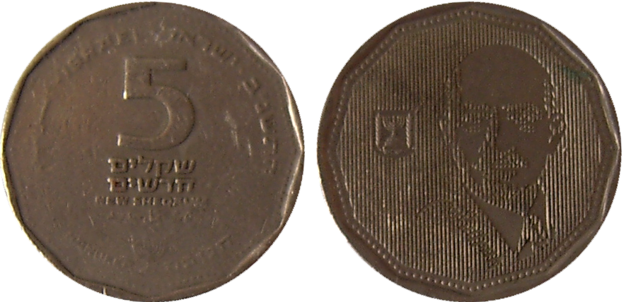 Israeli New Sheqel 5 sheqalim